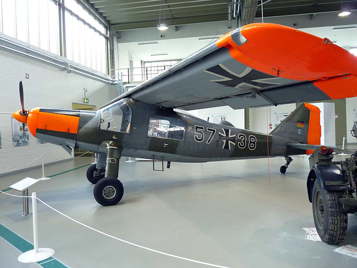 Dornier Do-27 im Luftwaffenmuseum Gatow